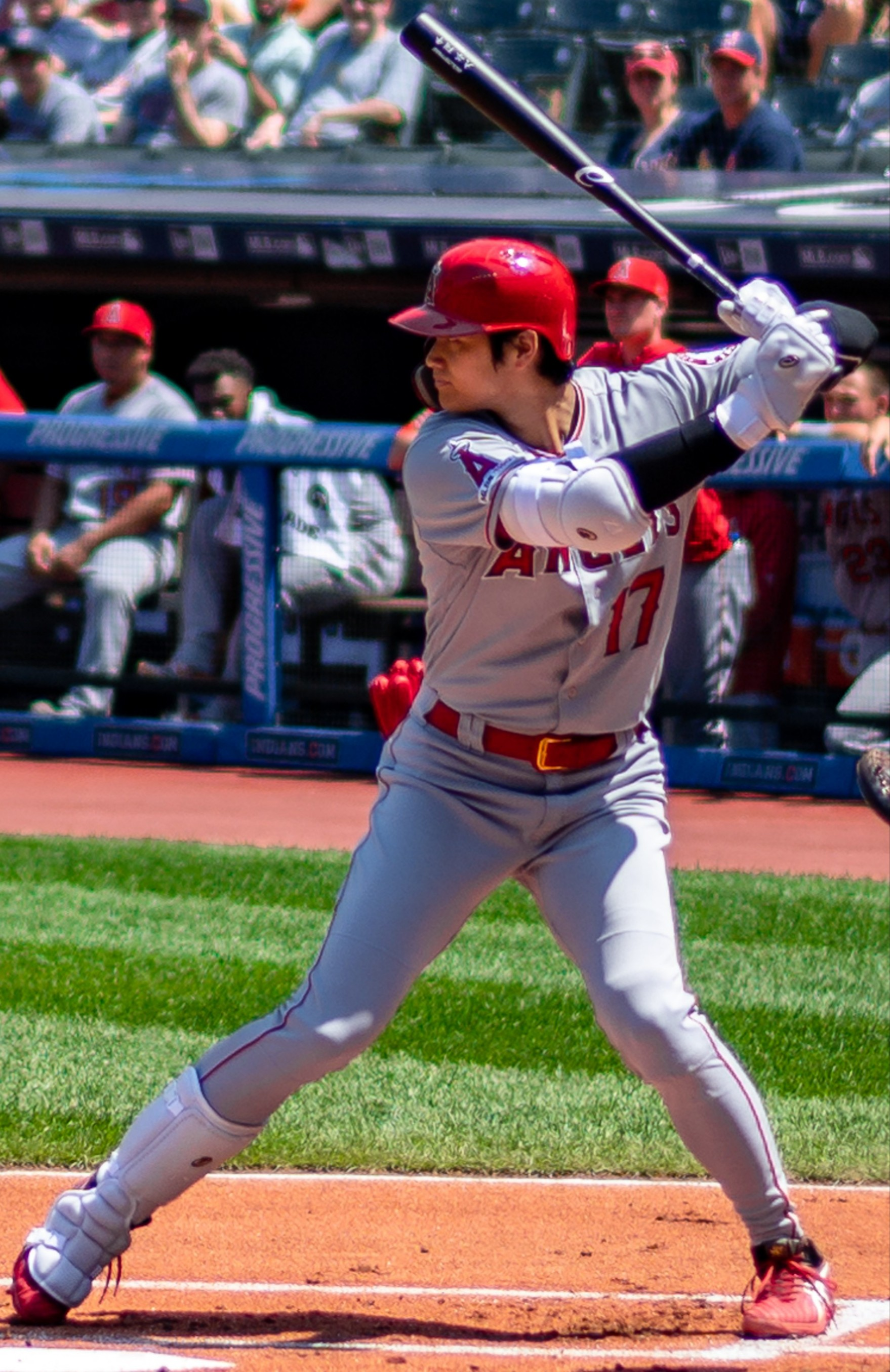 Los Angeles Angels VS. Cleveland Indians